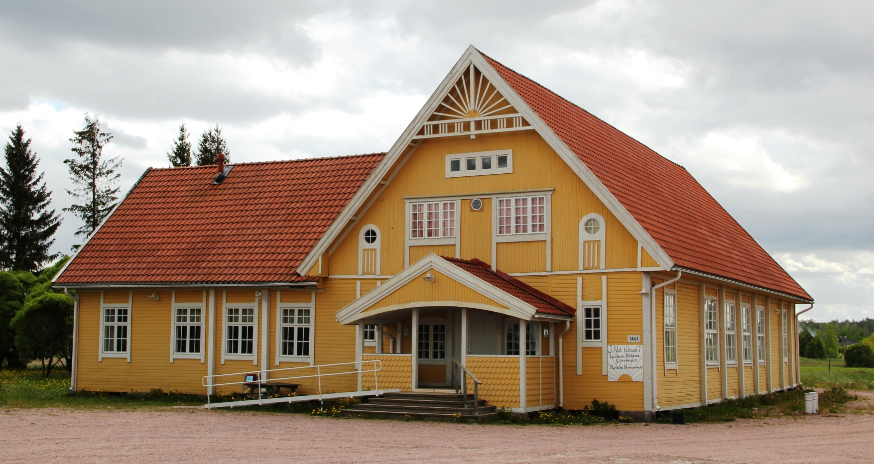 Marttilan nuorisoseurantalo